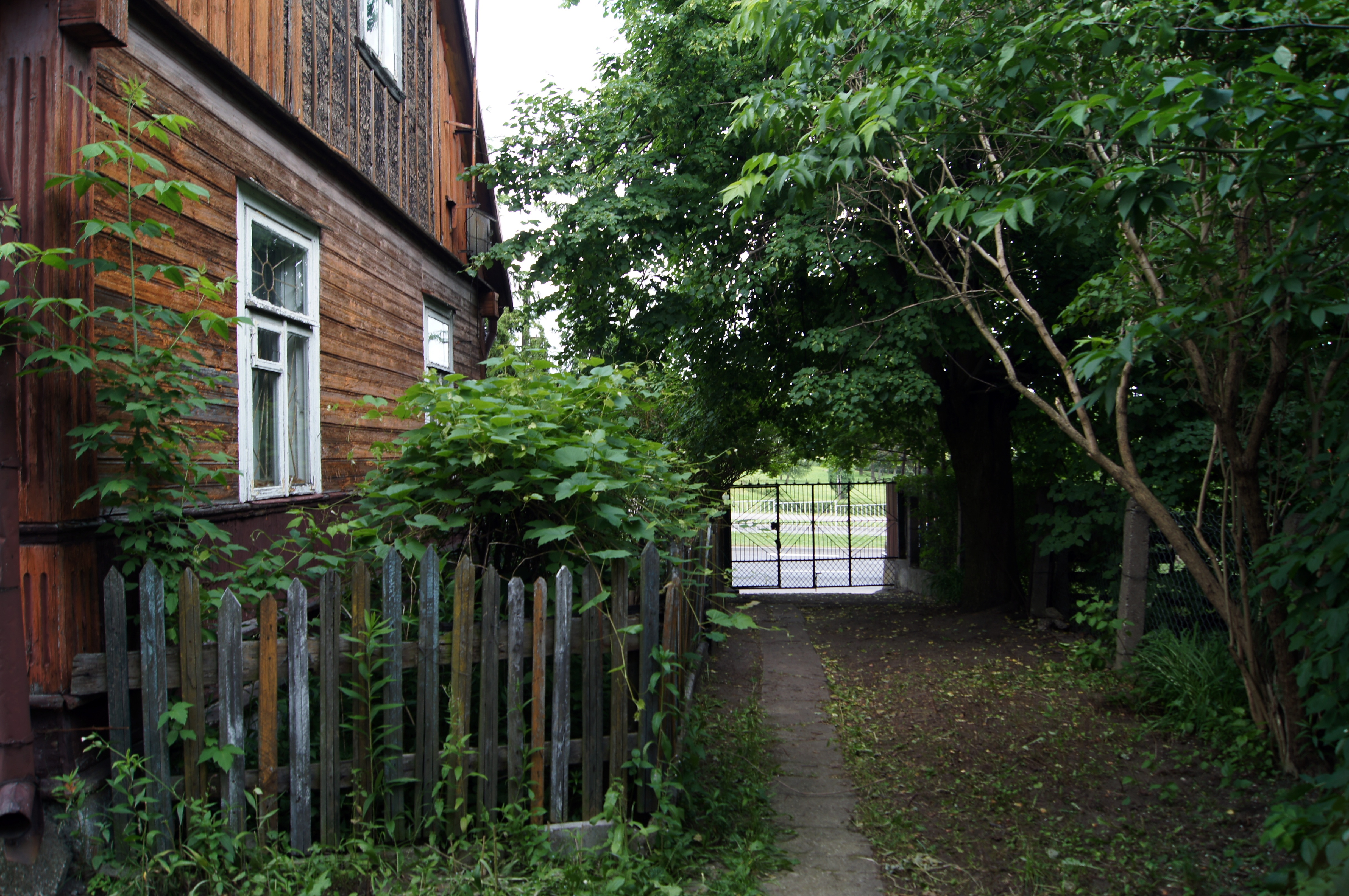 Dom Mariana Piekarskiego przy ulicy Podhorskiego 5 (dawniej Kolejowa 8/1) w Suwałkach.